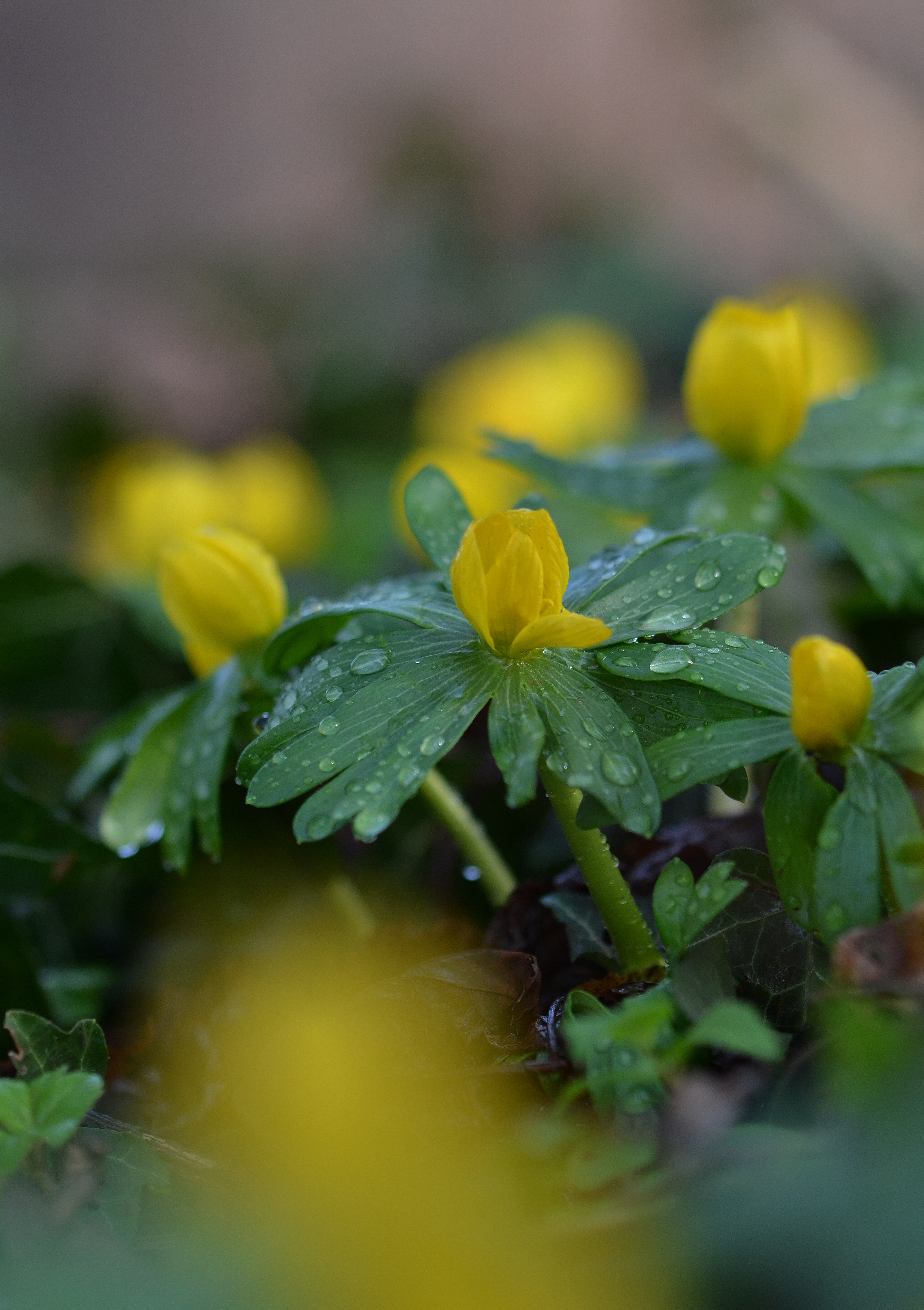 Winterakoniet